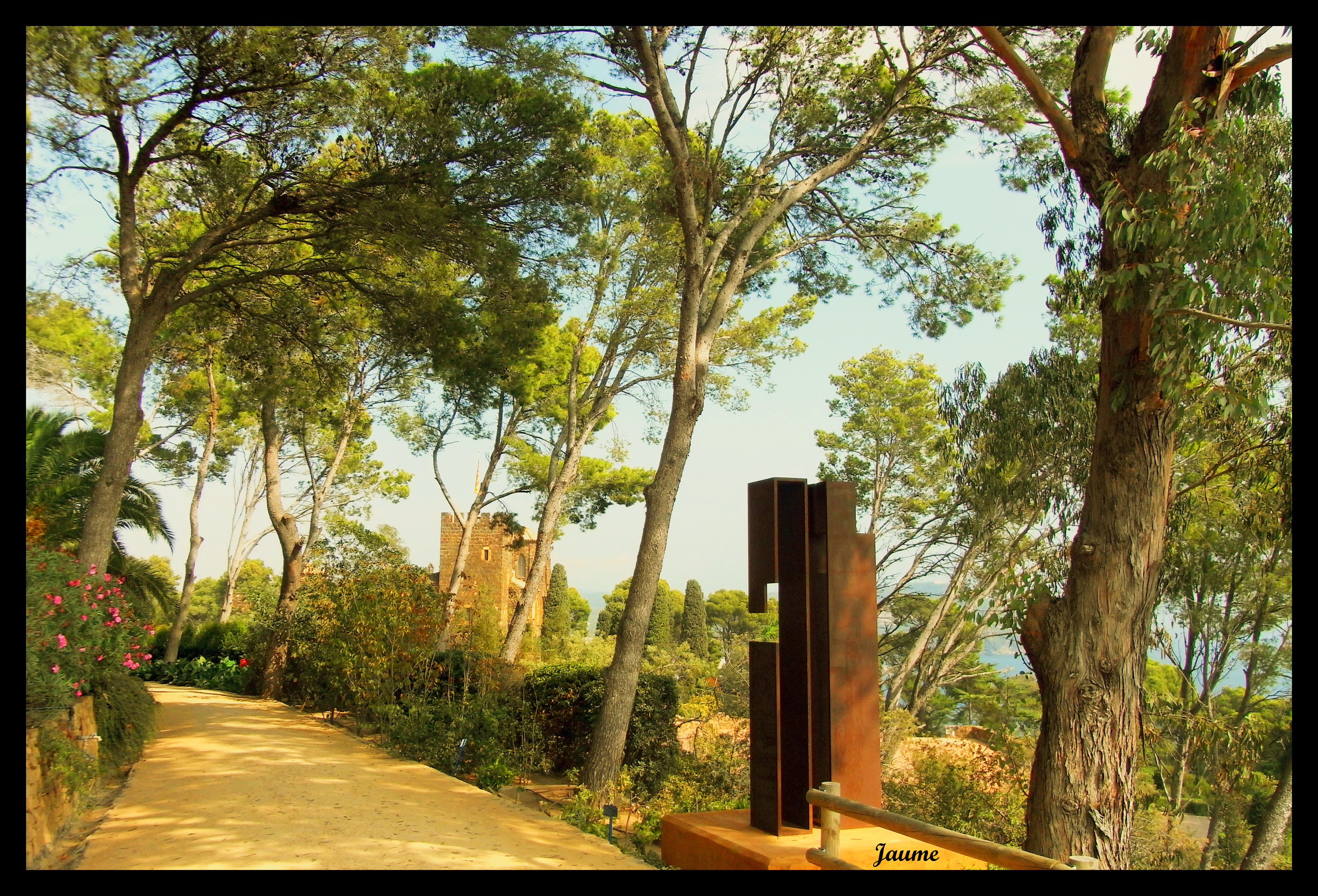 CALELLA de PALAFRUGELL - Jardins de Cap Roig. "VARIACIONS" (2008) Juan de Andrés (Arévalo-Uruguai, 1941) Acer corten 300 x 106 x 56 cm